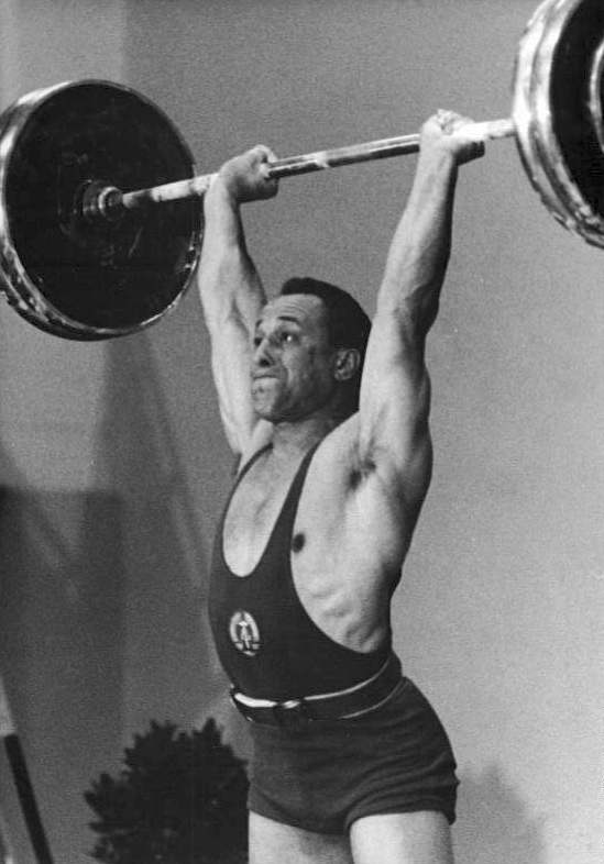 Werner Dittrich ADN-ZB Wendorf-15.08.1972 Berlin: DDR-Olympiamannschaft 1972-Gewichtheben Werner Dittrich (Motor Zittau)